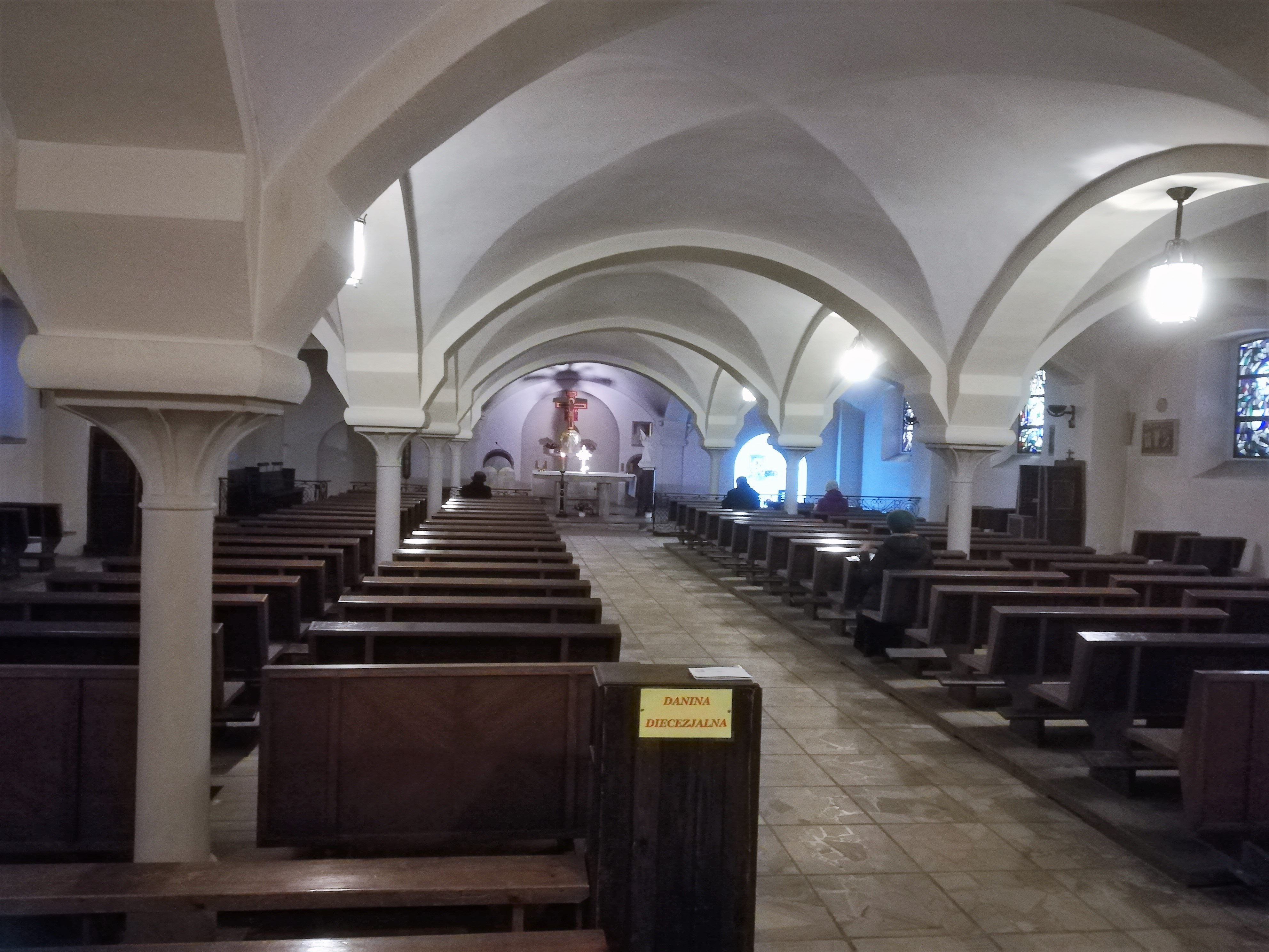 Wnętrze kościoła św. Michała Archanioła w Poznaniu. Dolny